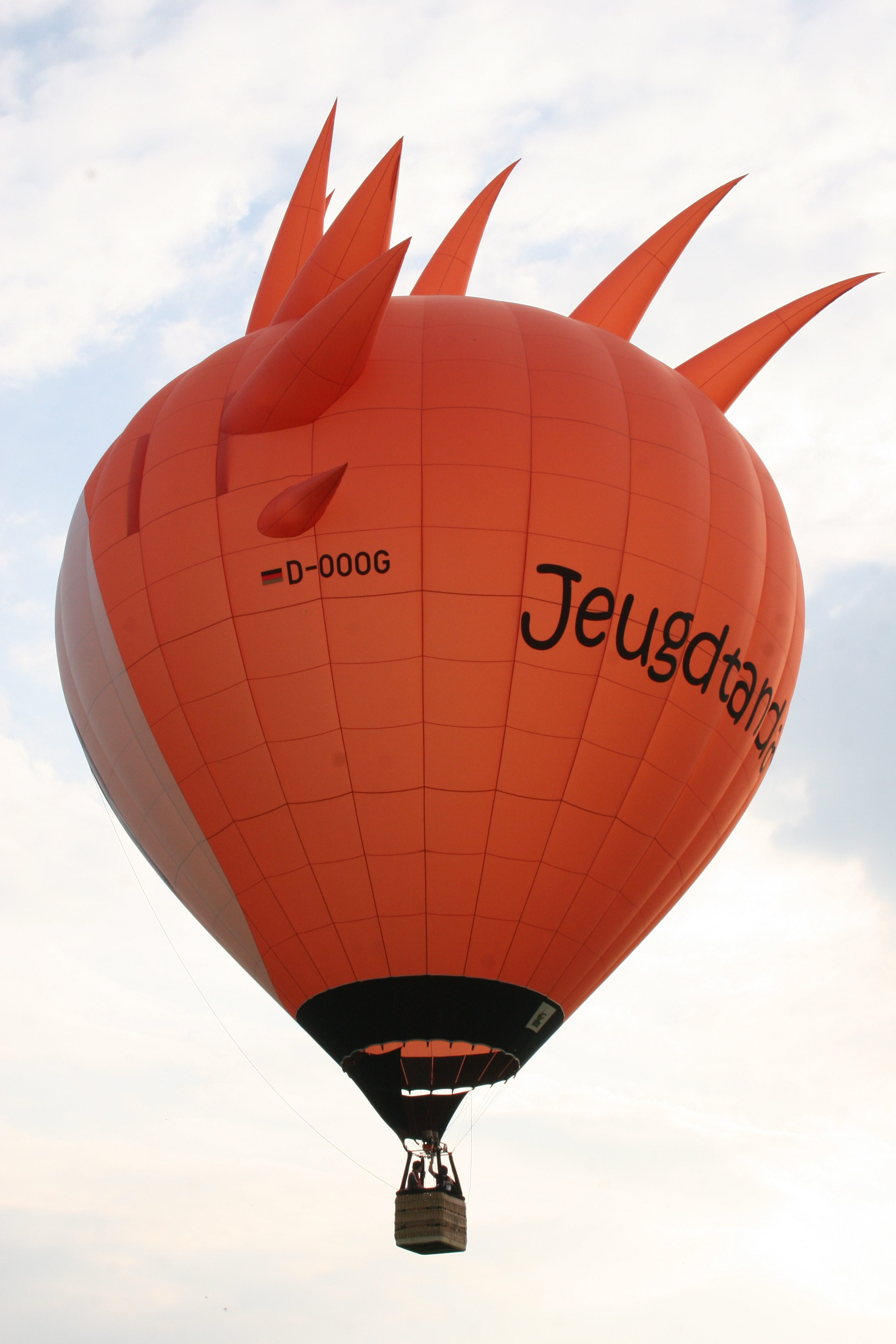 D-OOOG Kennzeichnung eines Ballons